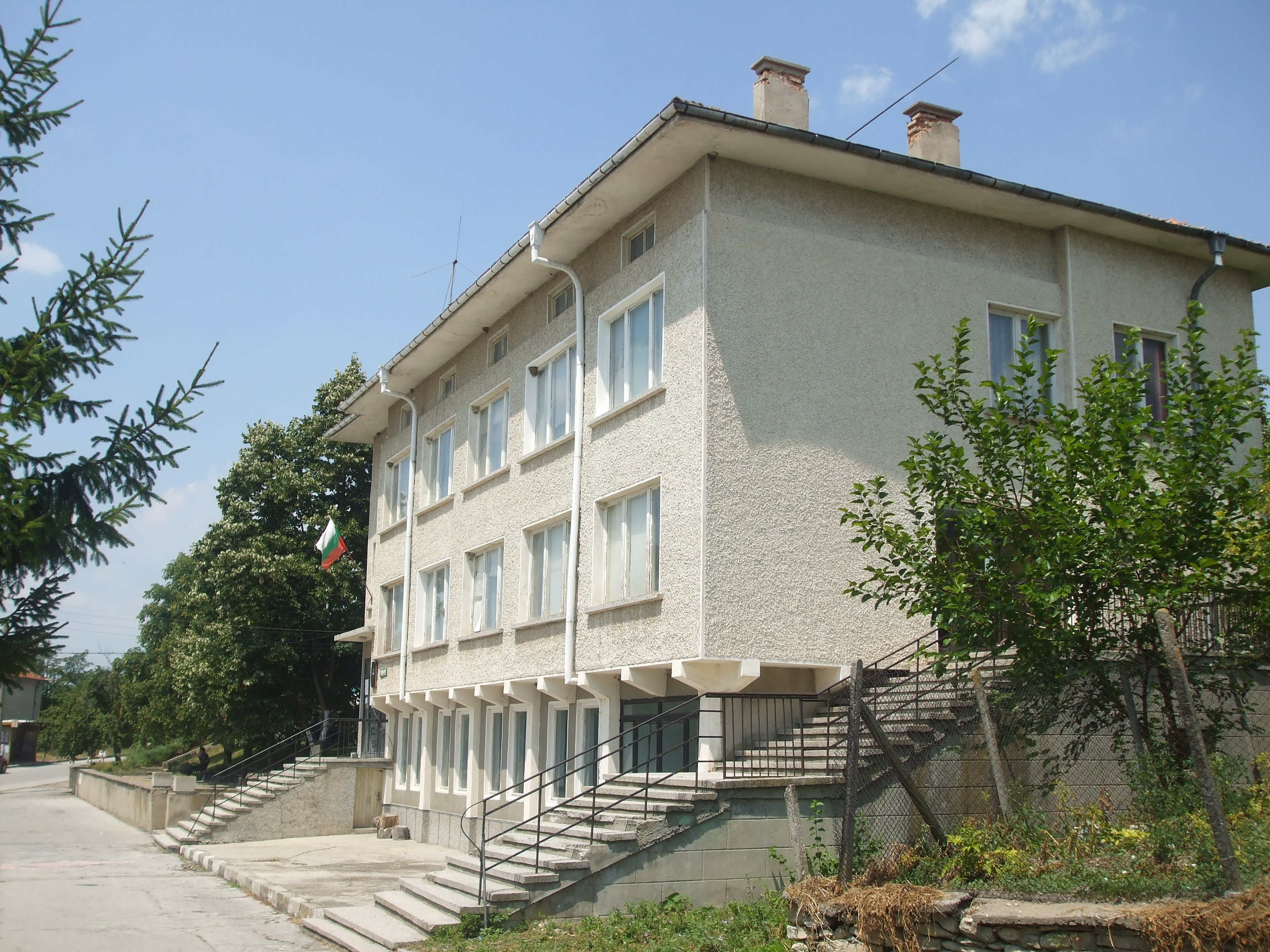 Сграда на кметството в село Съединение, Община Търговище